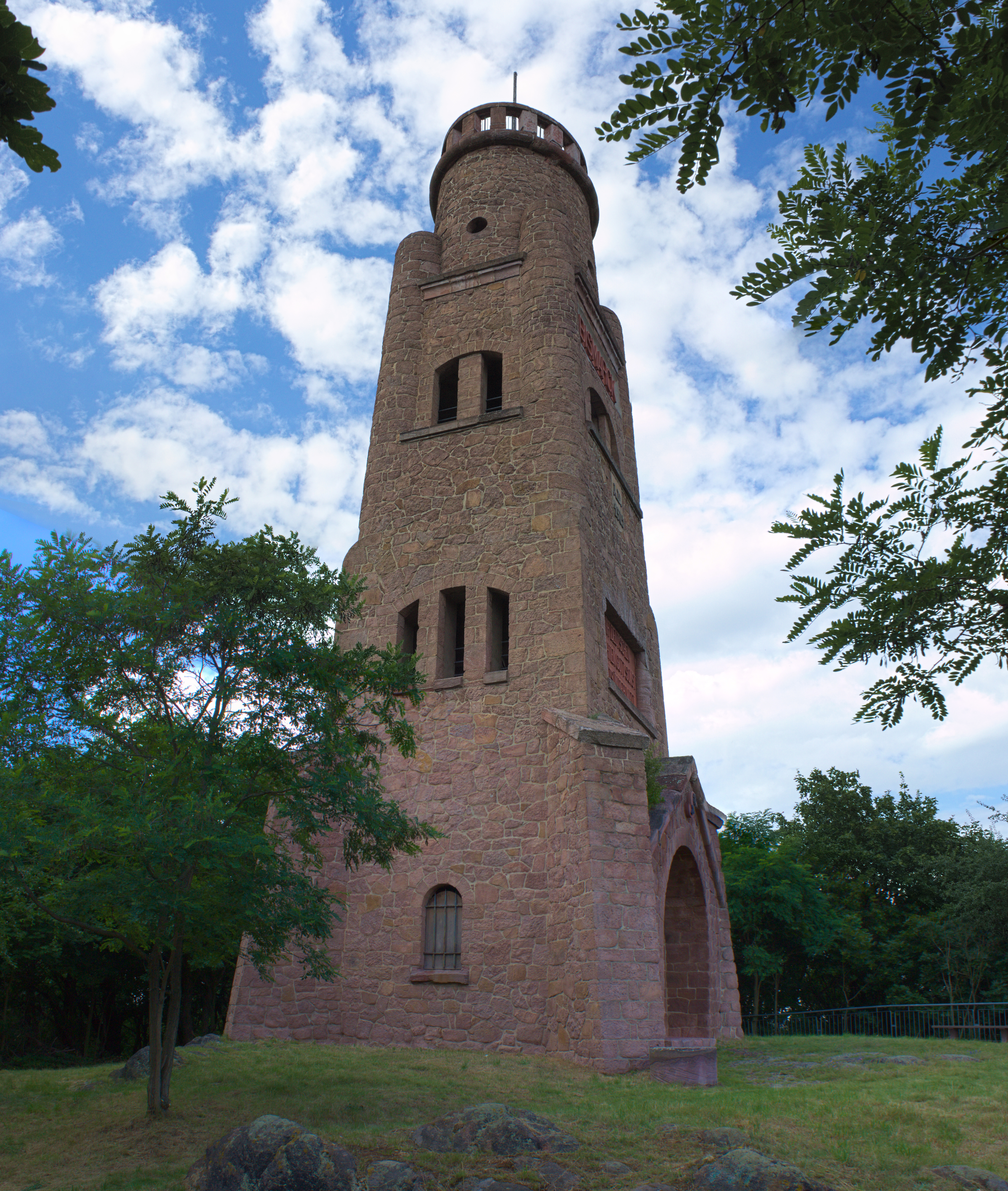 Bismarkturm